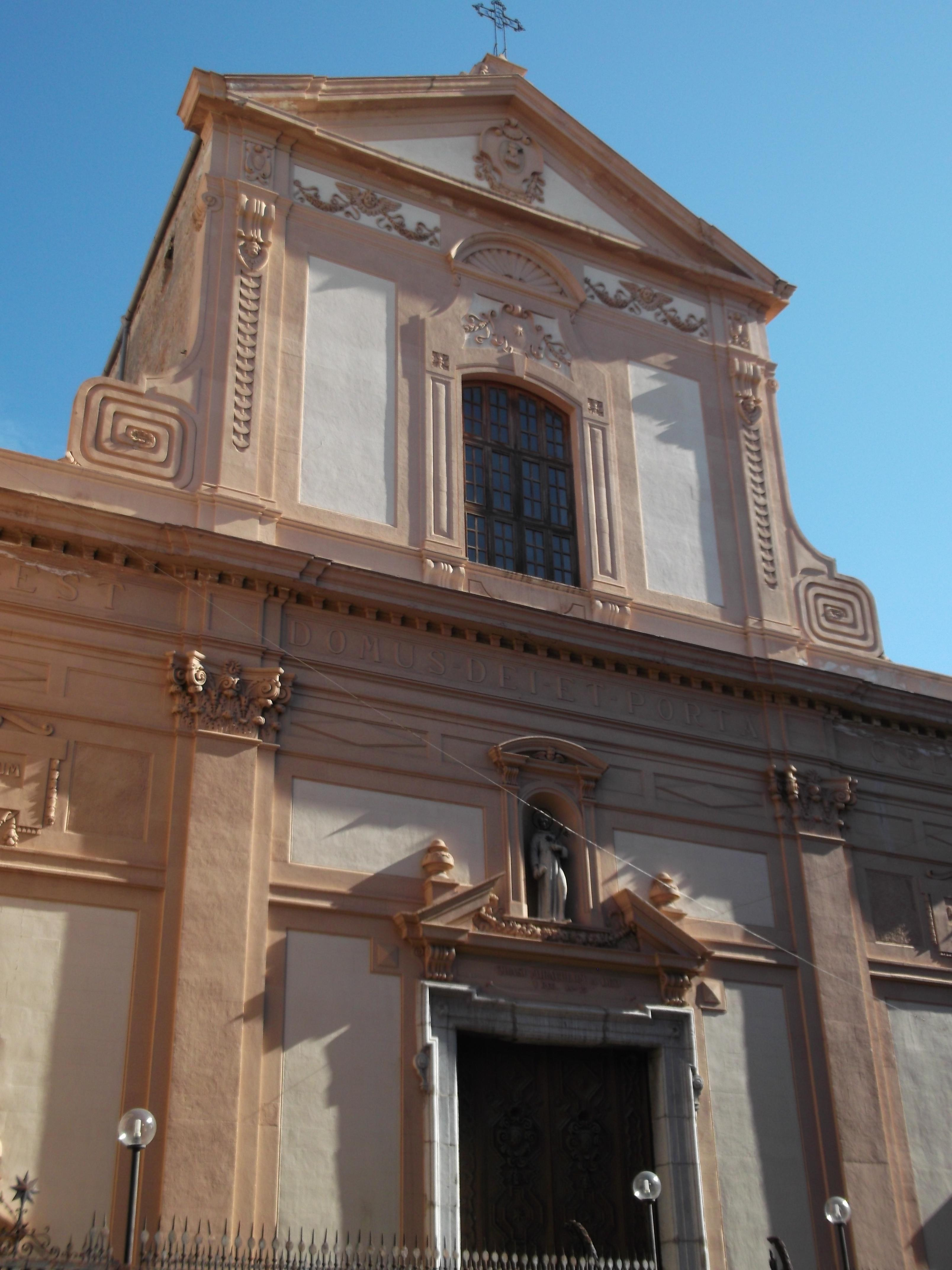 Facciata